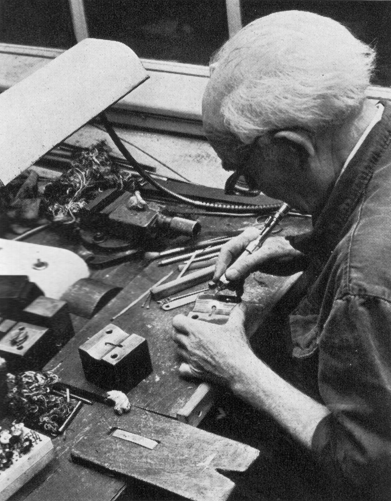 Herstellung eines Pelz-Klipverschlusses der Firma C. Keskari, den „Keska“. Gravierung des Gesenkes, in dem die Oberteile der Verschlüsse geprägt werden.